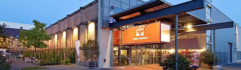 Frontview Theaterhaus Stuttgart Pragsattel